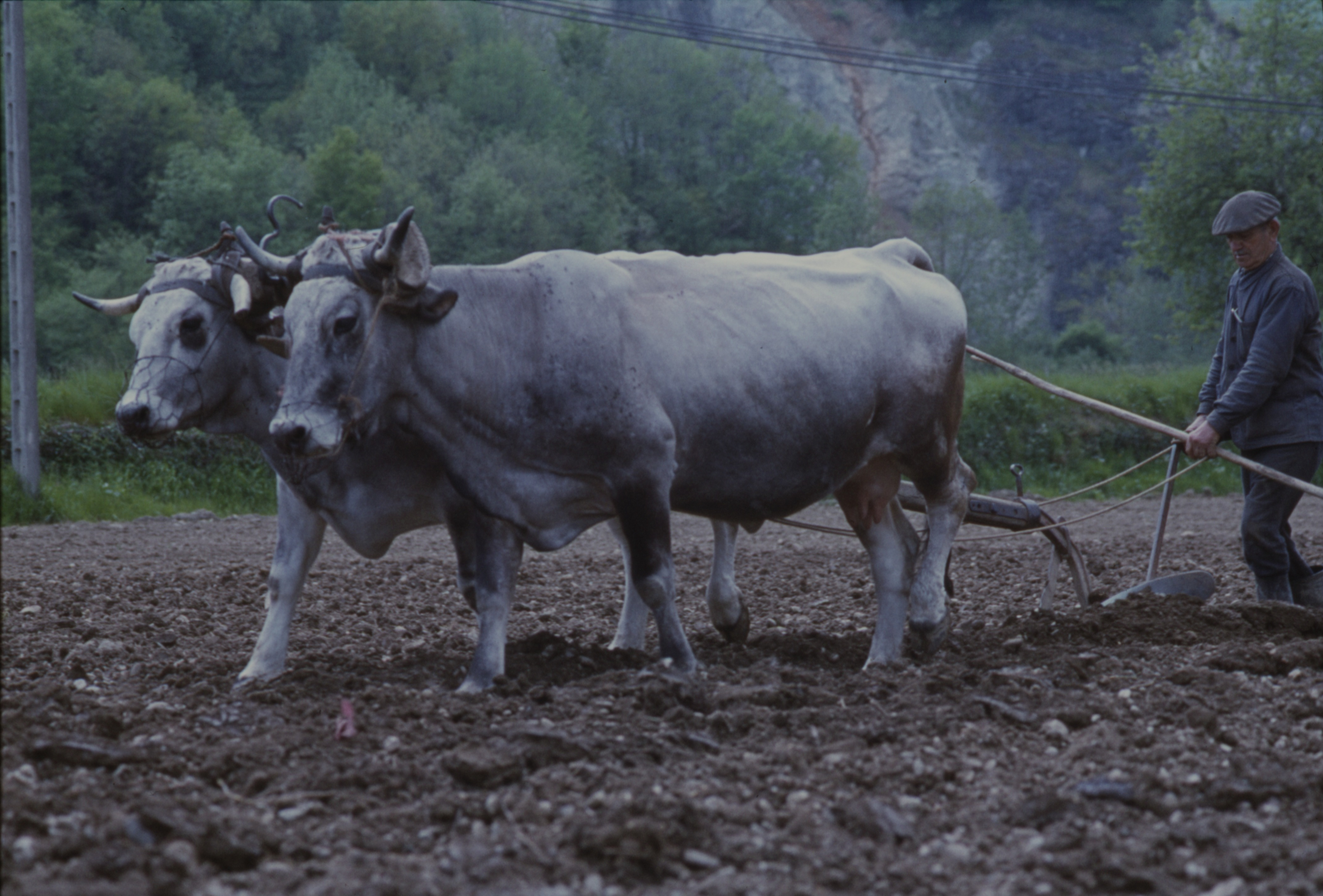 Plantation de pommes de terre en Ariège, dans le Couserans, en 1978, à Prat-Bonrepaux (Ariège, France), avec un attelage de vaches de la race gasconne.